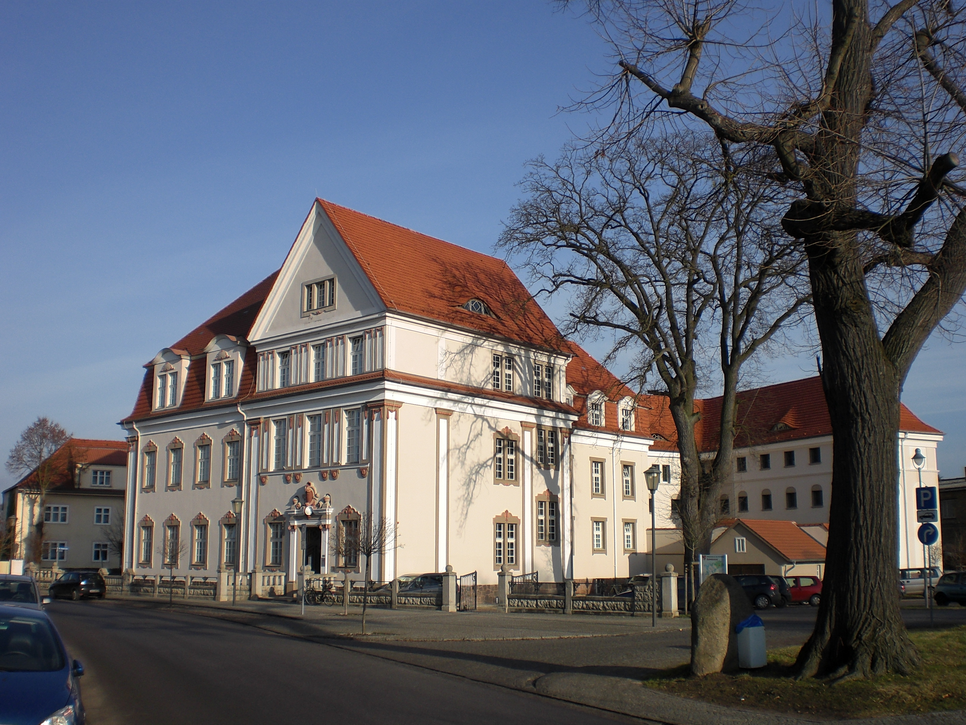 Amtsgericht Zehdenick (Landkreis Oberhavel, Brandenburg)